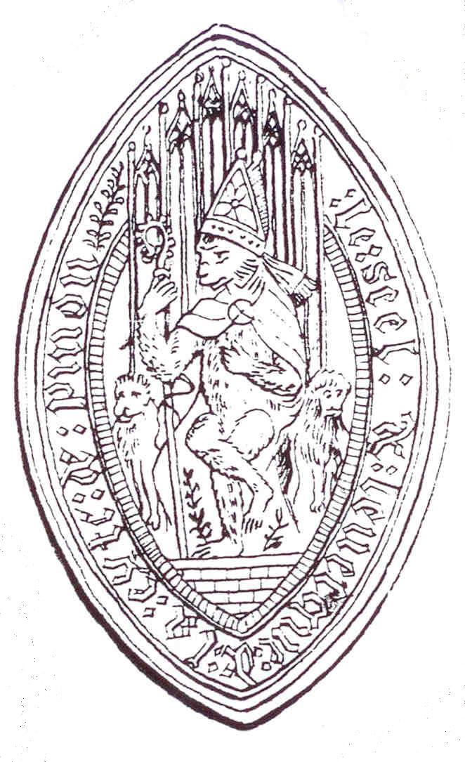 Sceau d'une société festive du XVème siècle retrouvé dans les ruines du château de Pinon dans l'Aisne et « conservé au Musée de Lyon ». Il figure un singe costumé en évêque assis sur un trône. Une inscription en caractères gothiques tourne autour : Le scel de levecque de la cyte de pinon (le sceau de l'évêque de la cité de Pinon). Il illustre une tradition très vivante à l'époque dans quantité de villes comme Dijon, Rouen, Sens ou Paris.